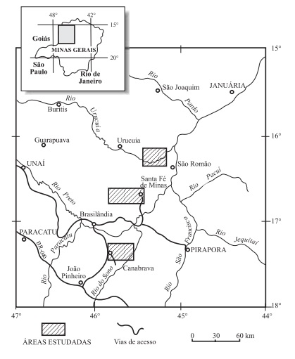 Português do Brasil: Localização das áreas estudadas da sedimentação glaciogênica do Grupo Santa Fé